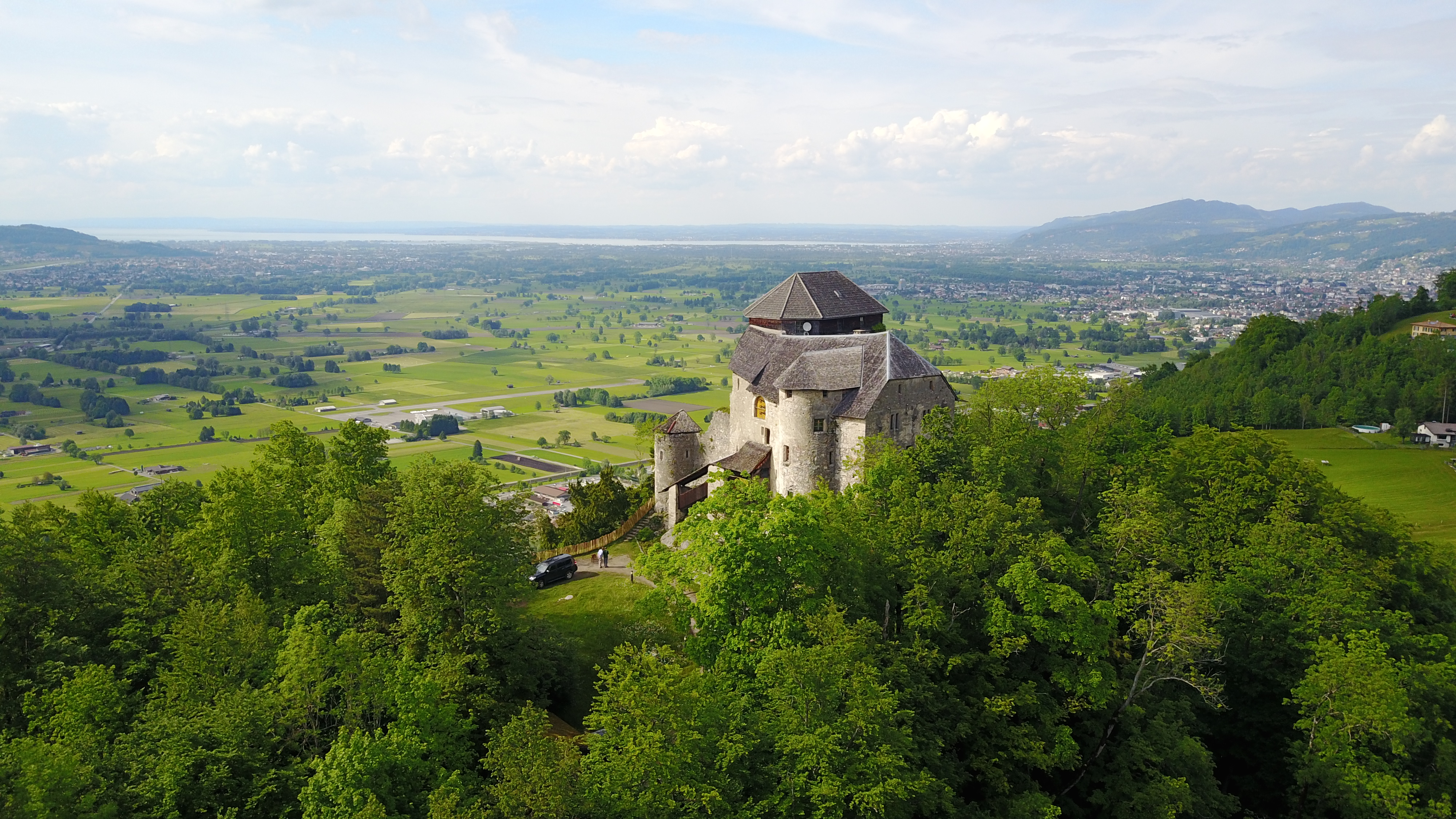 Luftbildaufnahme von Schloss Glopper mit Bodensee im Hintergrund